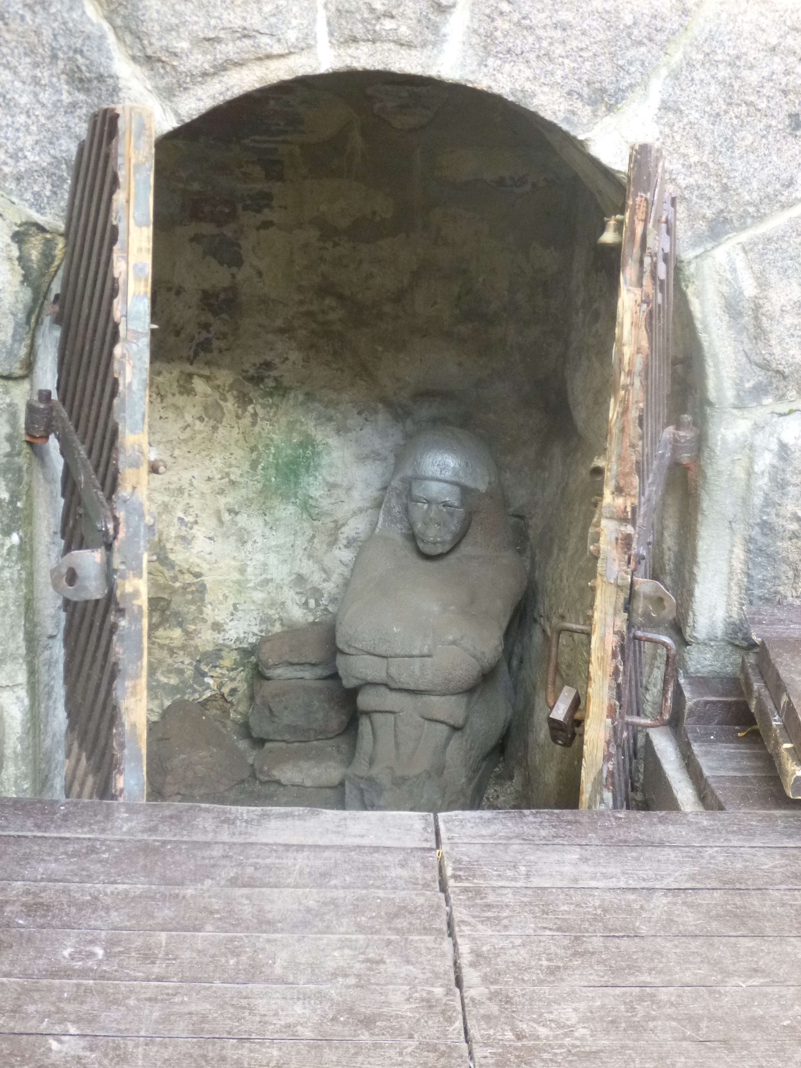 Погреб под башней Олафа (Санкт-Петербург и Лен.область, Выборг, Выборгская слобода, о. Замковый). Скульптура с дома Лалукки